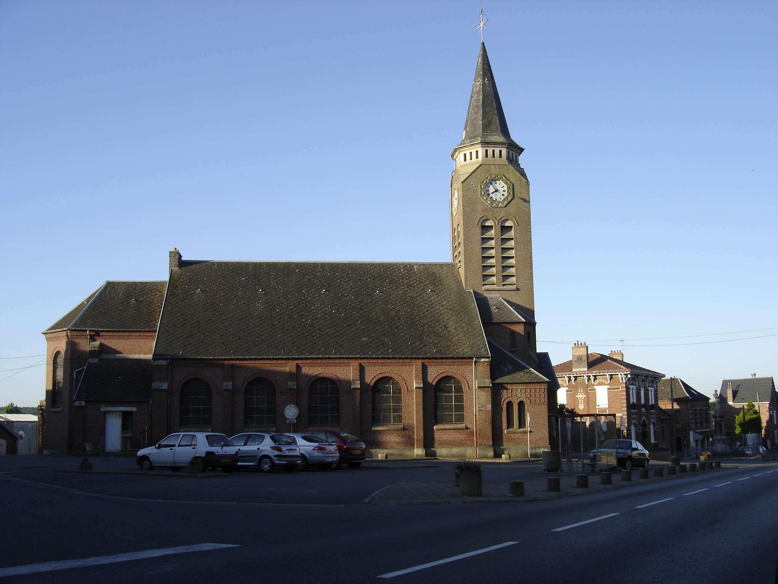 Église de Maretz